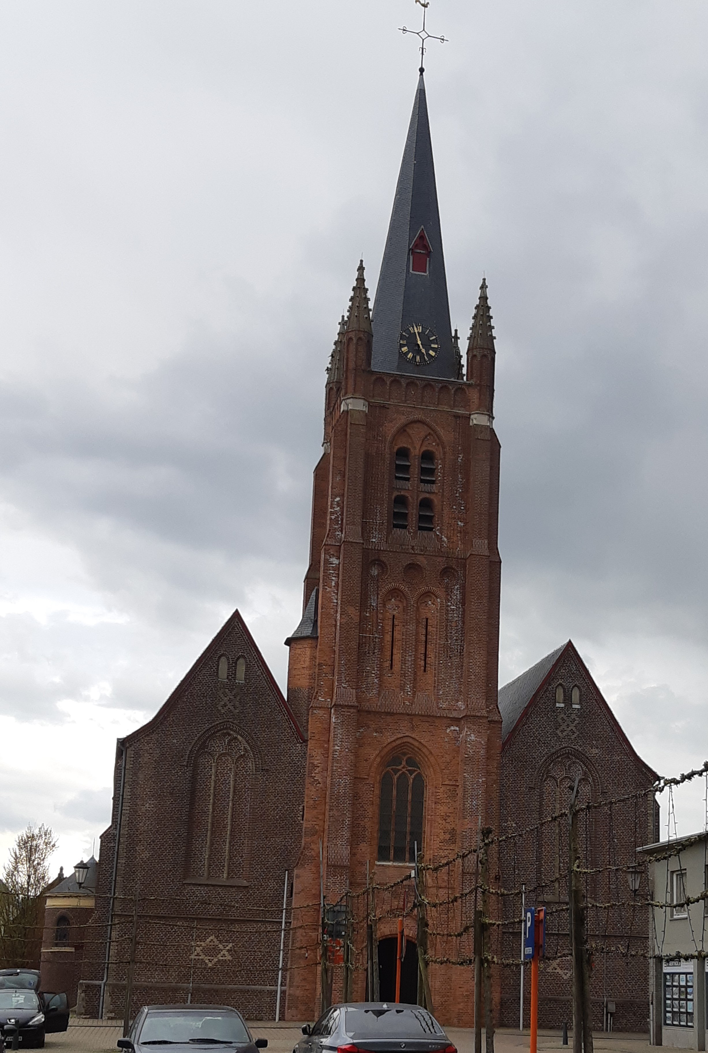 Vooraanzicht van de Wingense kerk